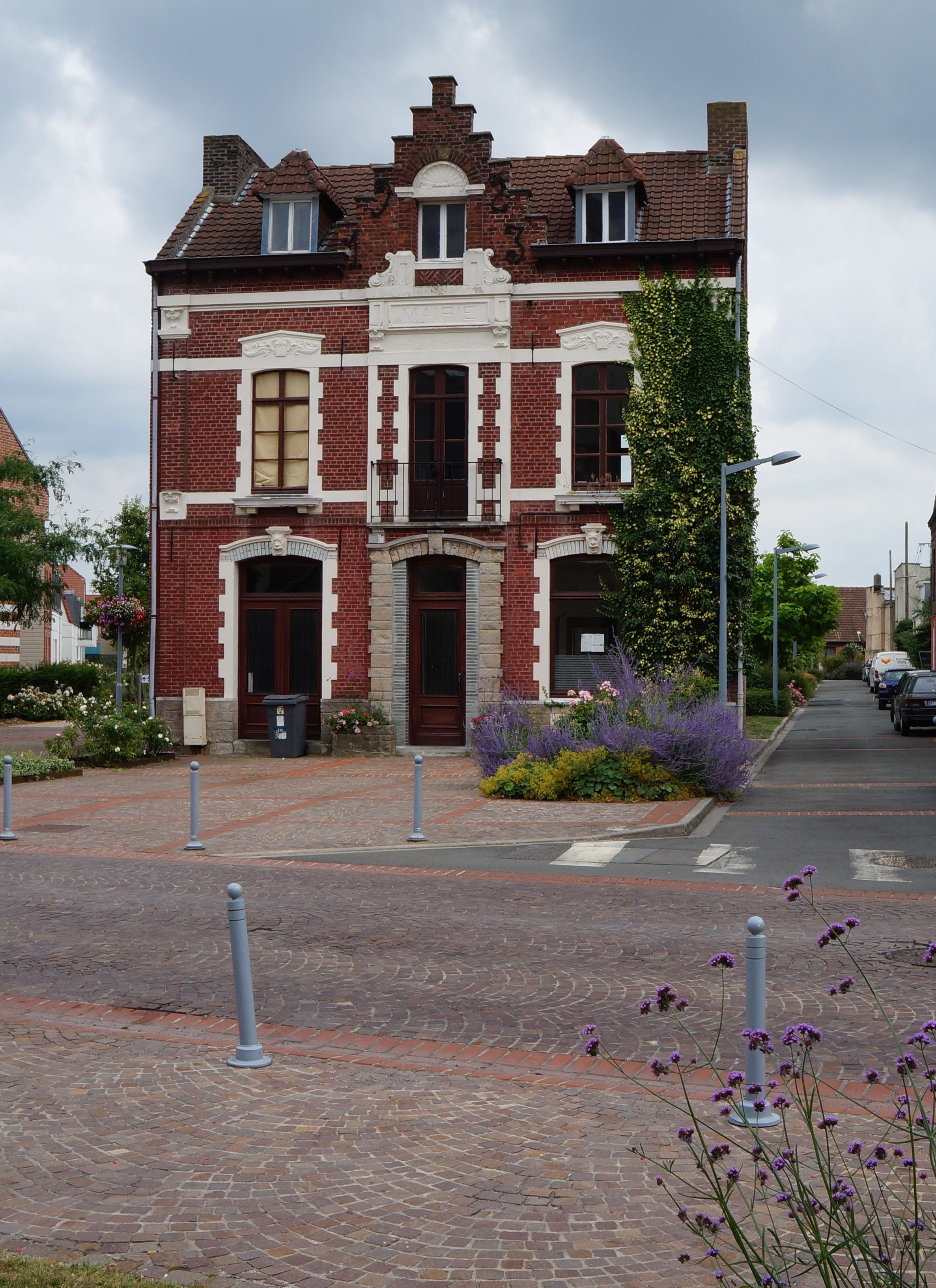 L'ancienne mairie, de Lezennes Nord (département français).